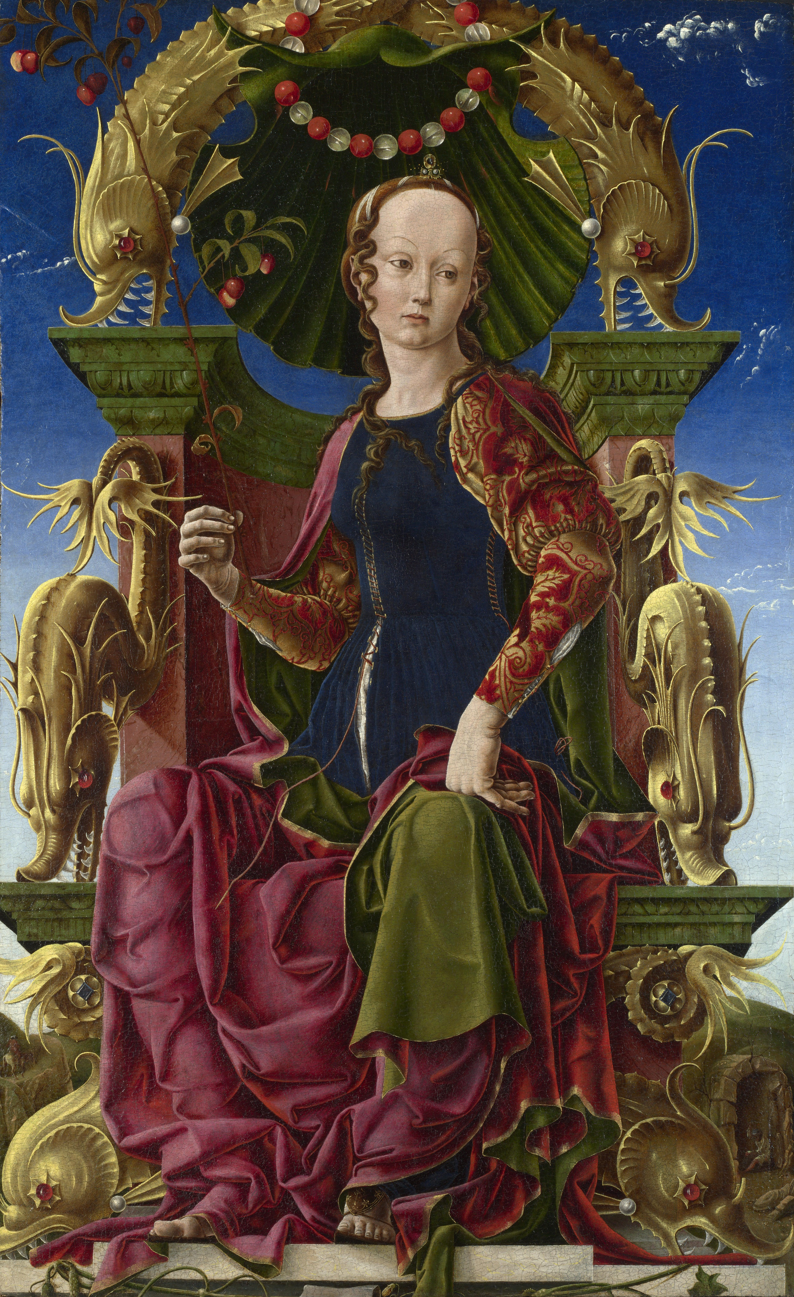 Allegorical Figure (Calliope?)